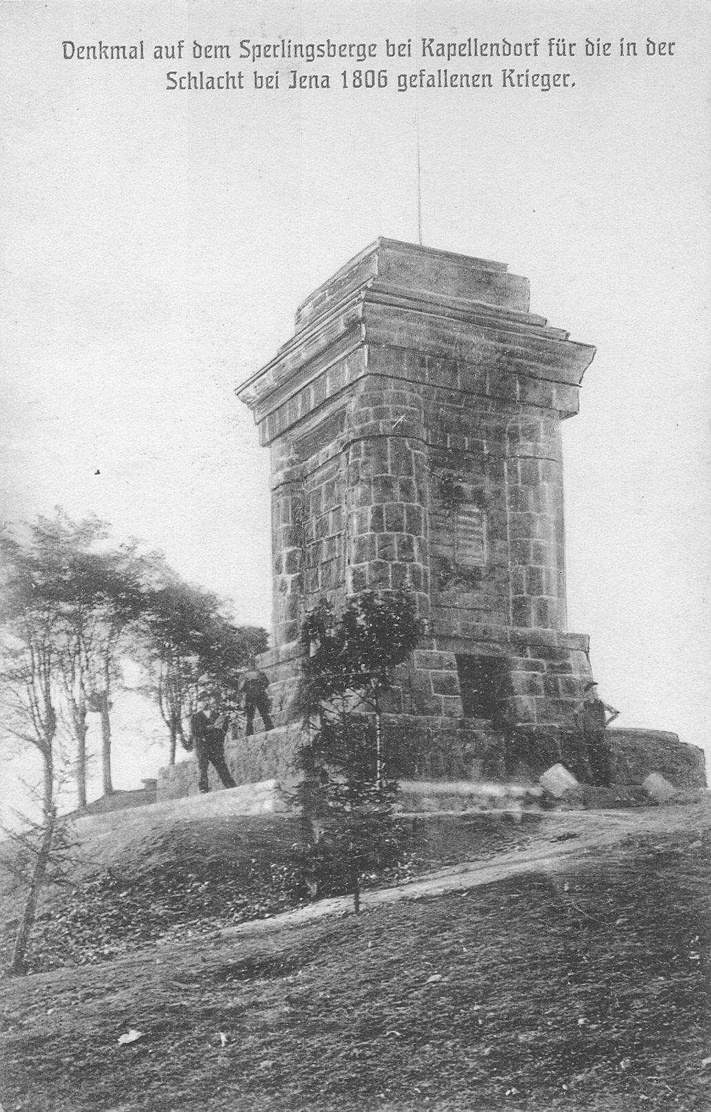 Kriegerdenkmal für die im 4. Koalitionskrieg 1806 bei Jena Gefallenen. Ansicht von Norden.